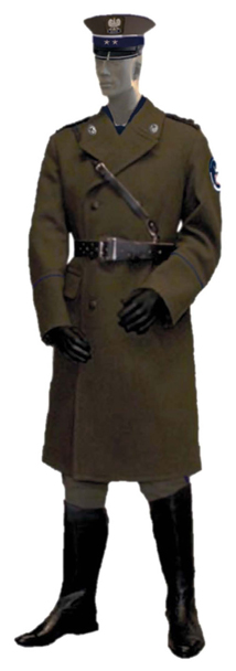 Umundurowanie reprezentacyjne ABW z płaszczem sukiennym